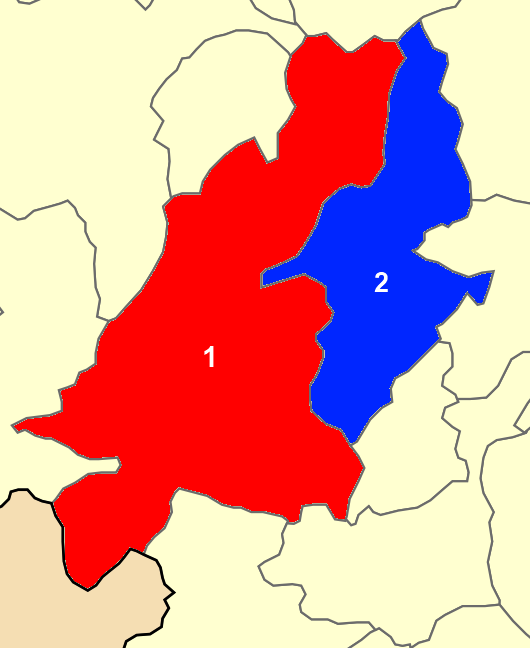 Χάρτης των ενοτήτων (και πρώην δήμων) από τις οποίες αποτελείται ο Δήμος Τυρνάβου